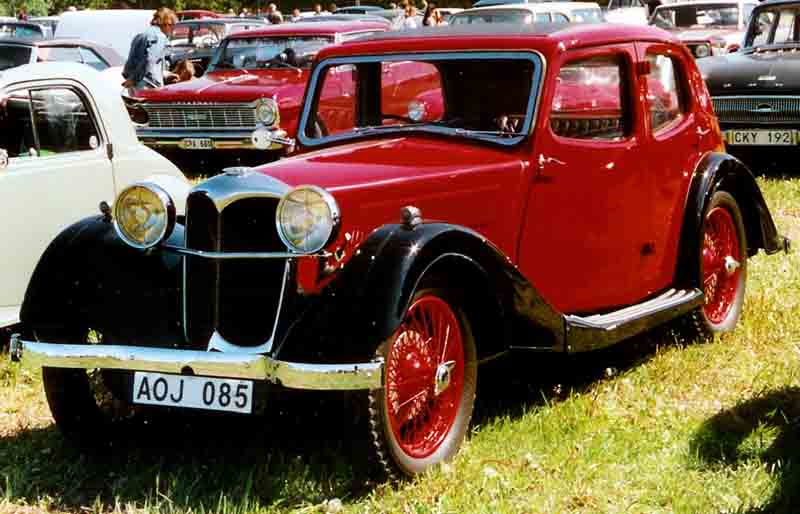 Riley Nine Kestrel Saloon 1936